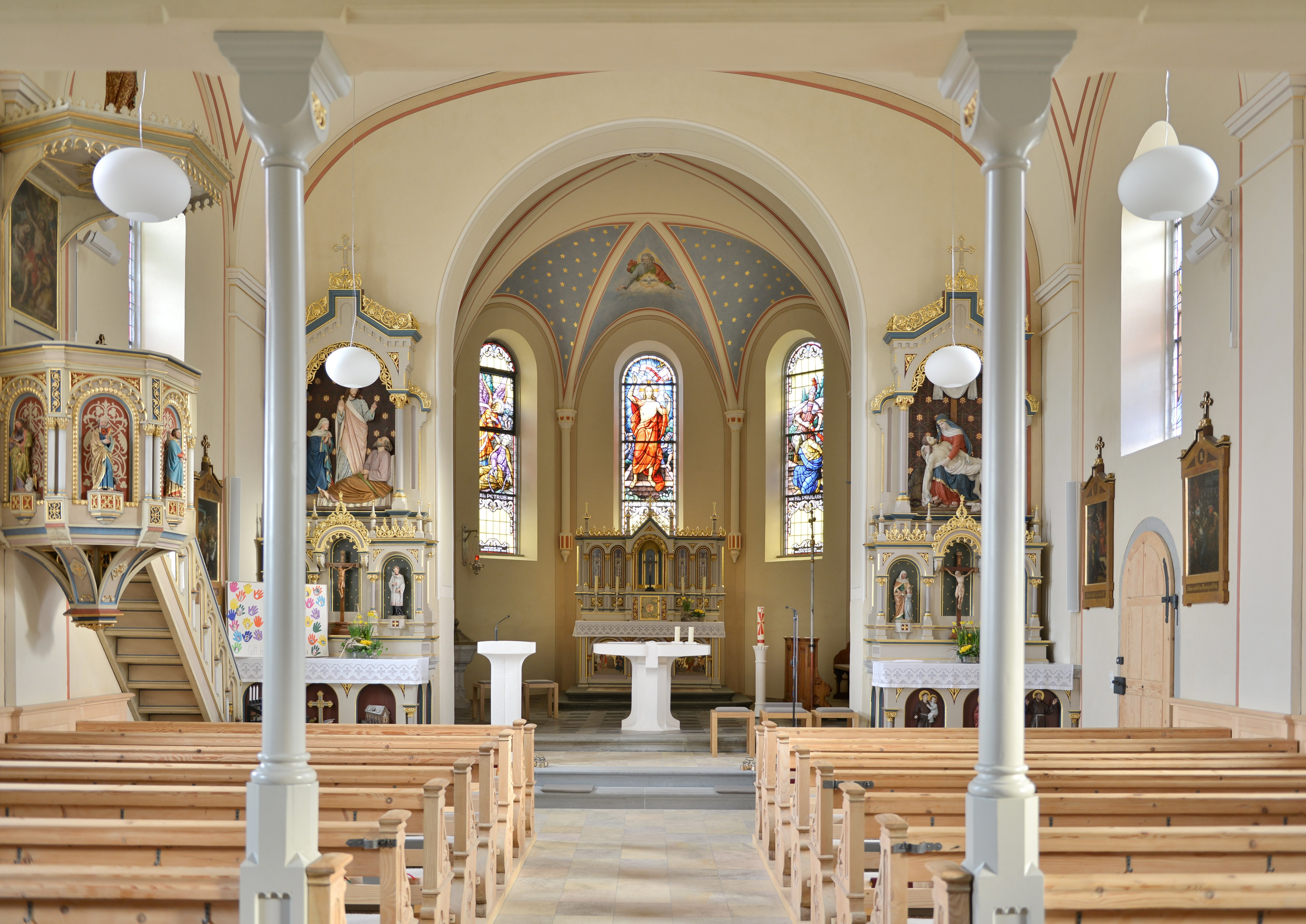 Expositurkirche: Herz Jesu und Mariae in Müselbach, (Alberschwende).